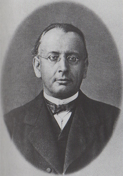 Шиме Љубић, археолог (1822-1896)